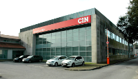 Centro de I&D